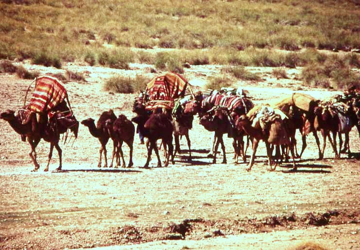 Caravane de nomades dans la région de Djelfa, Algérie.